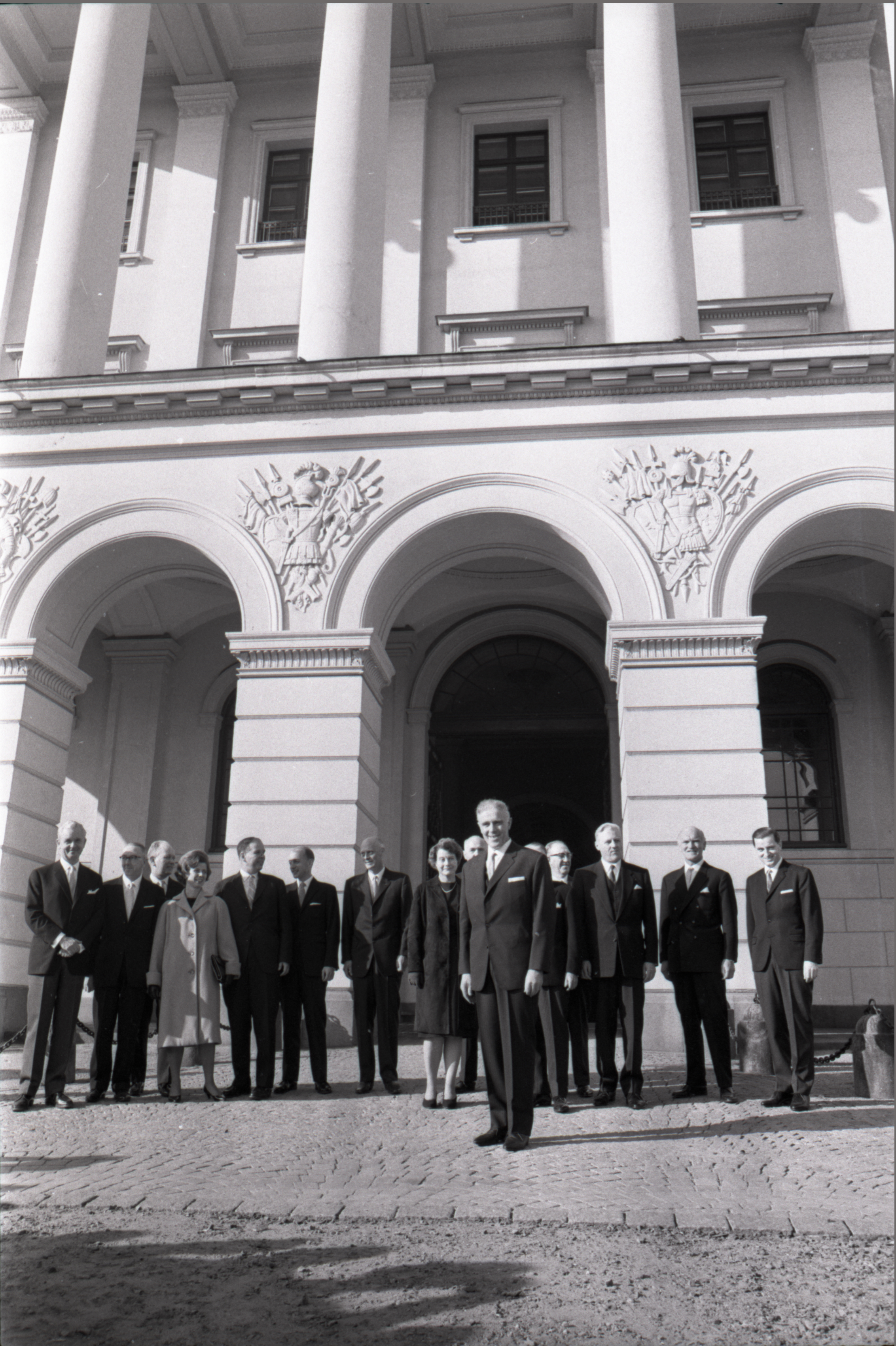 Bildet er hentet fra Arkivverket. Regjeringen Borten har sitt første statsråd på Oslo slott. NÅ nr. 43, 1965. Per Bortens regjering ble utnevnt 12. oktober 1965 og satt til 17. mars 1971. Arkivinstitusjon : Riksarkivet Arkivnavn : Billedbladet NÅ Sted : NORGE, Oslo, Oslo, Emneord: Norske regjeringer, Norske statsministre, Politikk Avbildet: Statsminister Per Borten (Sp) står foran (fra venstre) forsvarsminister (seinere handelsminister) Otto Grieg Tidemand (H), arbeids- og sosialminister Egil Aarvik (KrF), industriminister Sverre Walter Rostoft (H), justis- og politiminister Elisabeth Schweigaard Selmer (H), kommunal- og arbeidsminister Helge Seip (V), handels- og skipsfartsminister Kåre Willoch (H), finans- og tollminister Ole Myrvoll (V), familie- og forbrukerminister Elsa Skjerven (KrF), kirke- og undervisningsminister Kjell Bondevik (KrF, bak Bortens høyre skulder), fiskeriminister Oddmund Myklebust (Sp), landbruksminister Bjarne Lyngstad (V), utenriksminister John Lyng (H), samferdselsminister Håkon Kyllingmark (H) og lønns- og prisminister Dagfinn Vårvik (Sp).